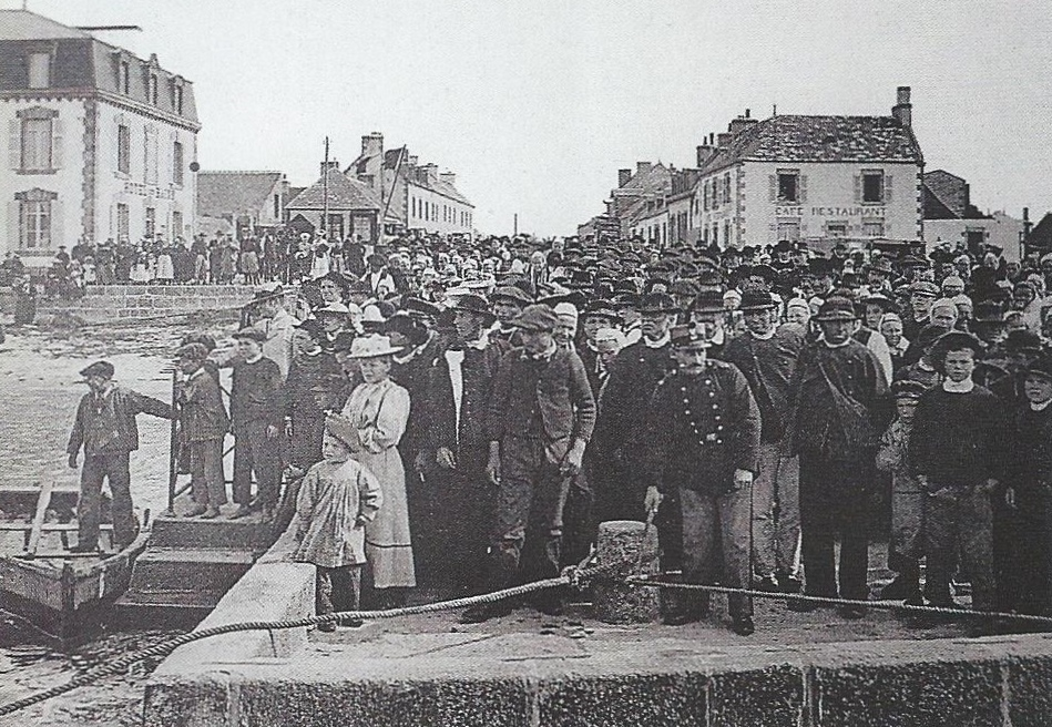 Le départ des régates de Loctudy au début du XXème siècle